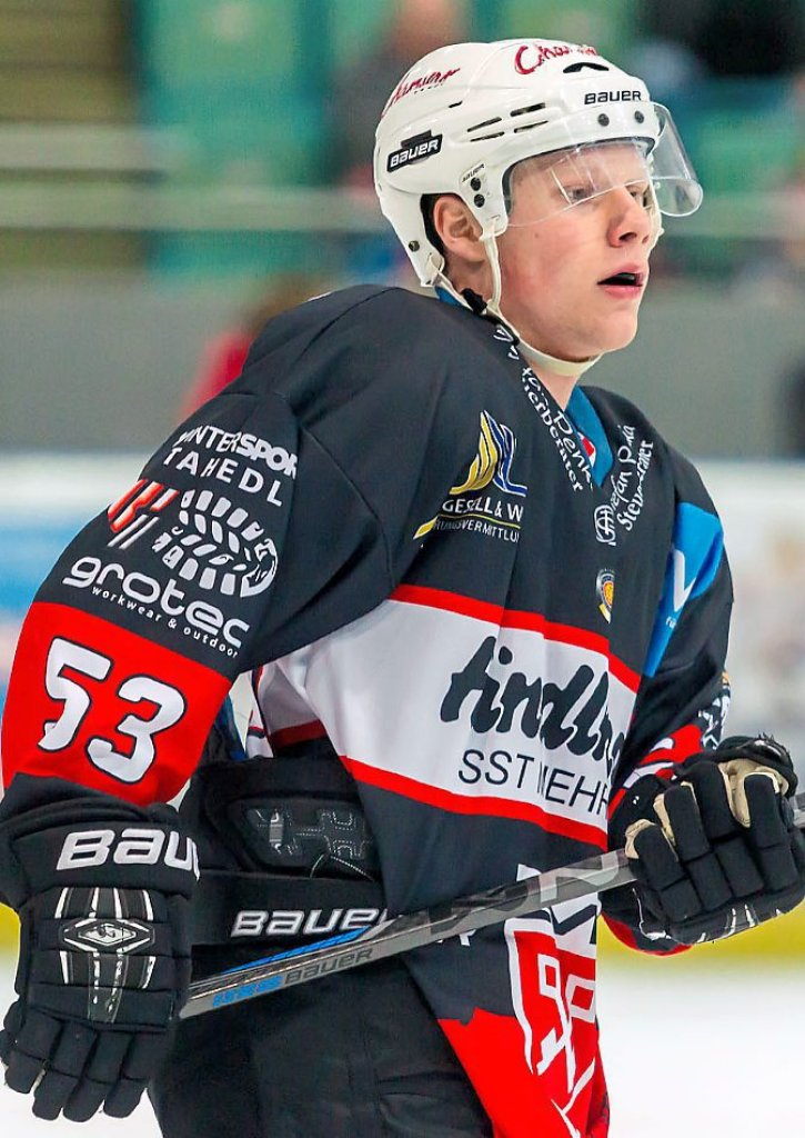 Bild